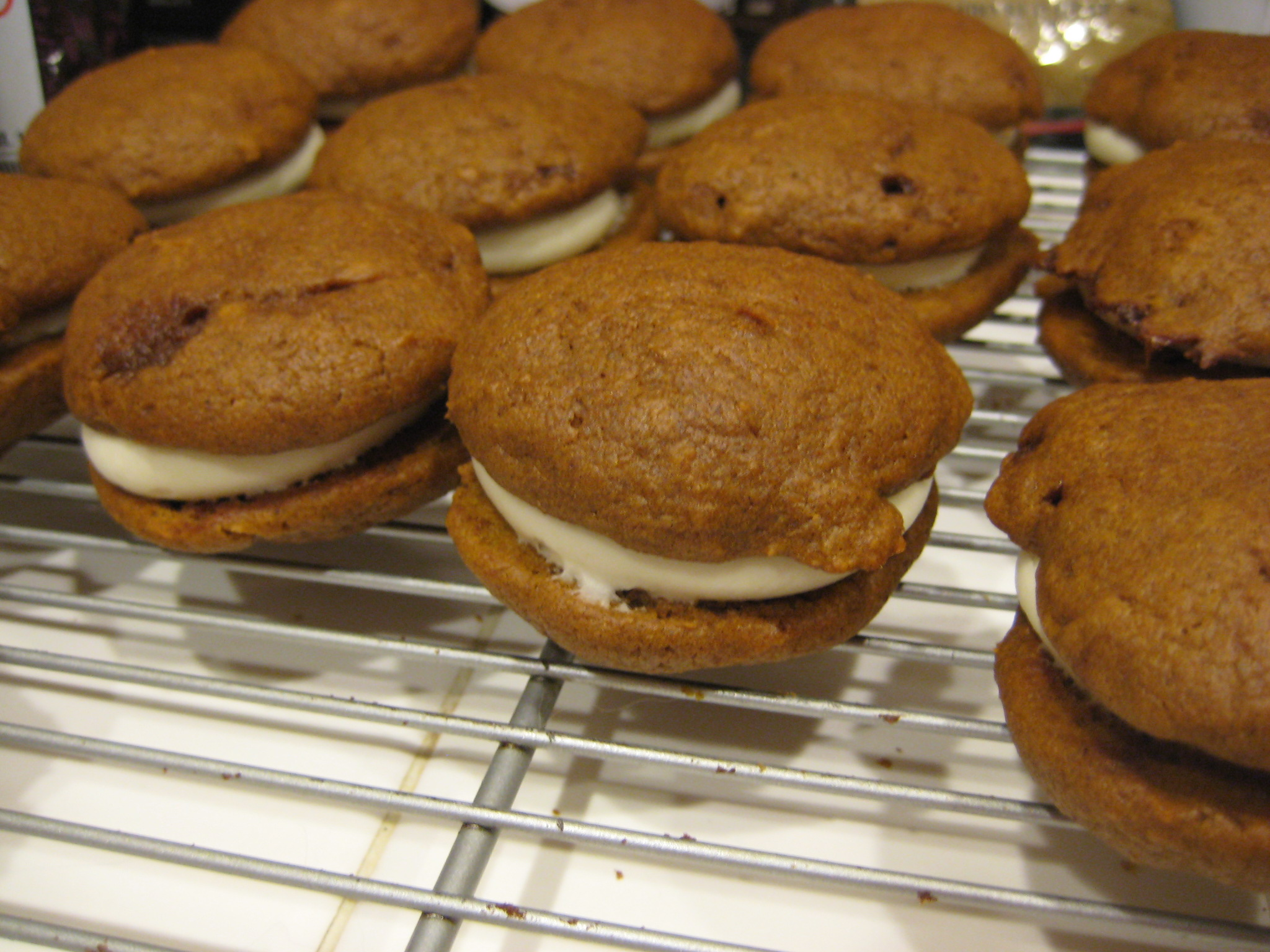 Halloween Whoopie Pies - maple.